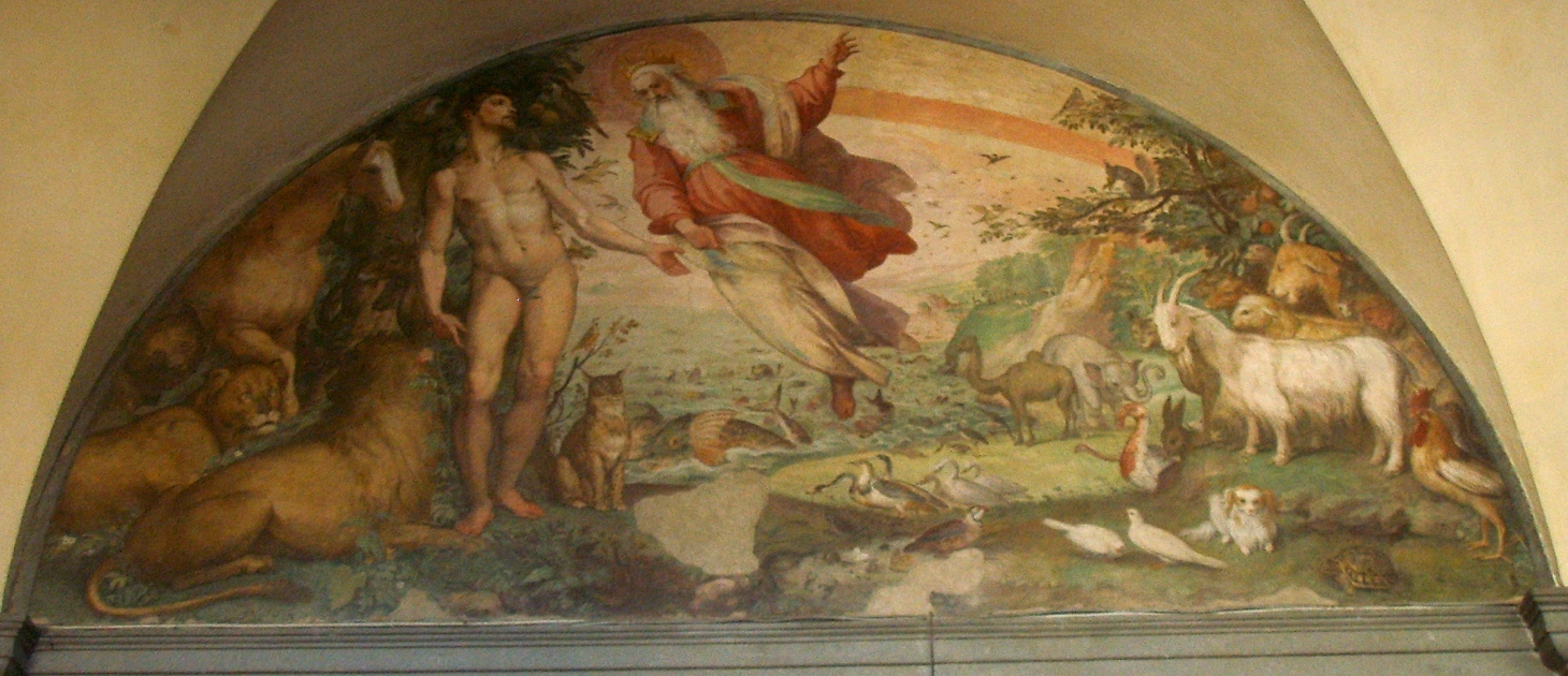 S.M. degli angeli, chiostro della sacrestia 02 al creazione di adamo, Bernardino Poccetti 2